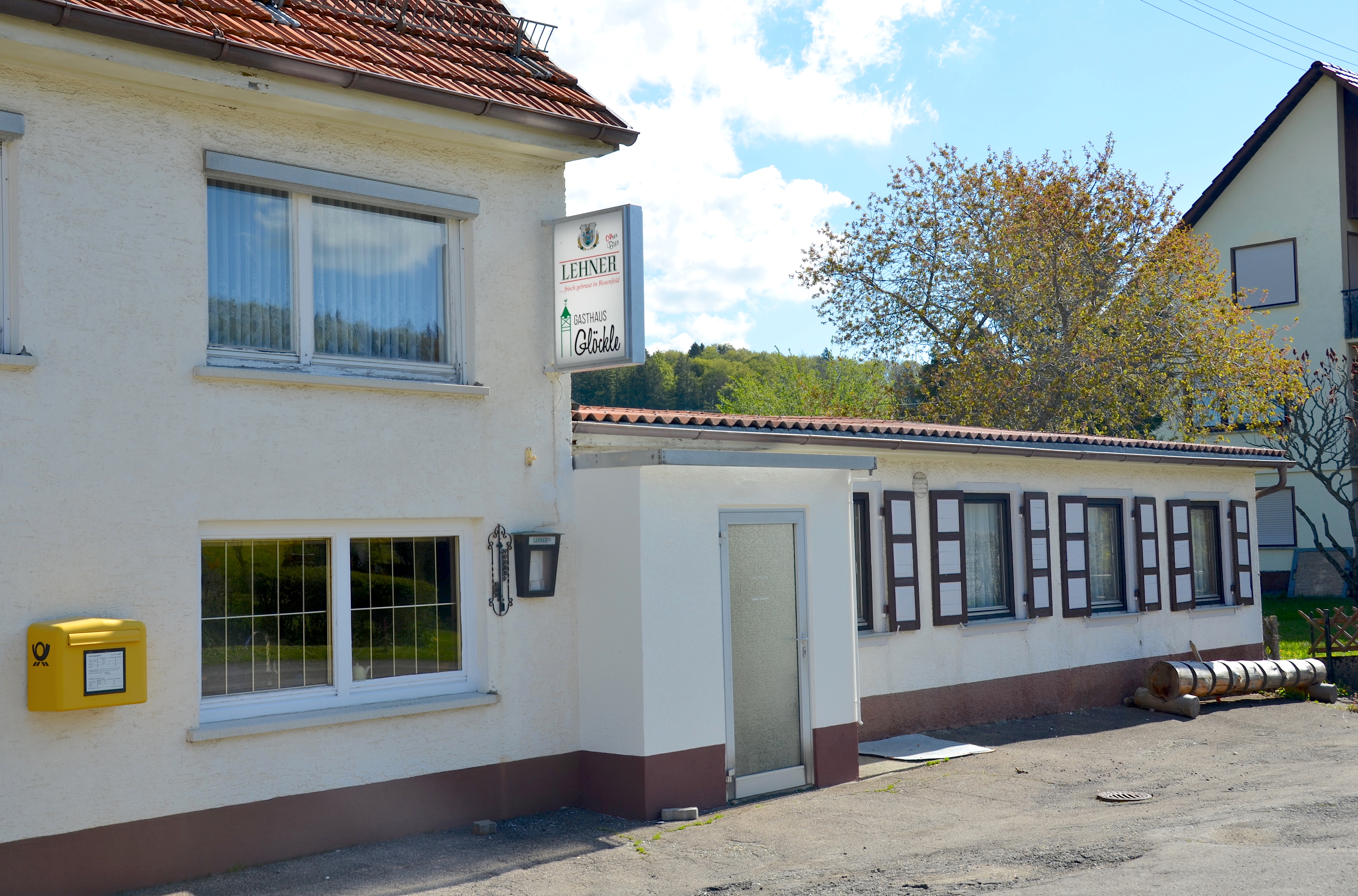 Gasthaus Glöckle in Geyerbad im Zollernalbkreis (2019)